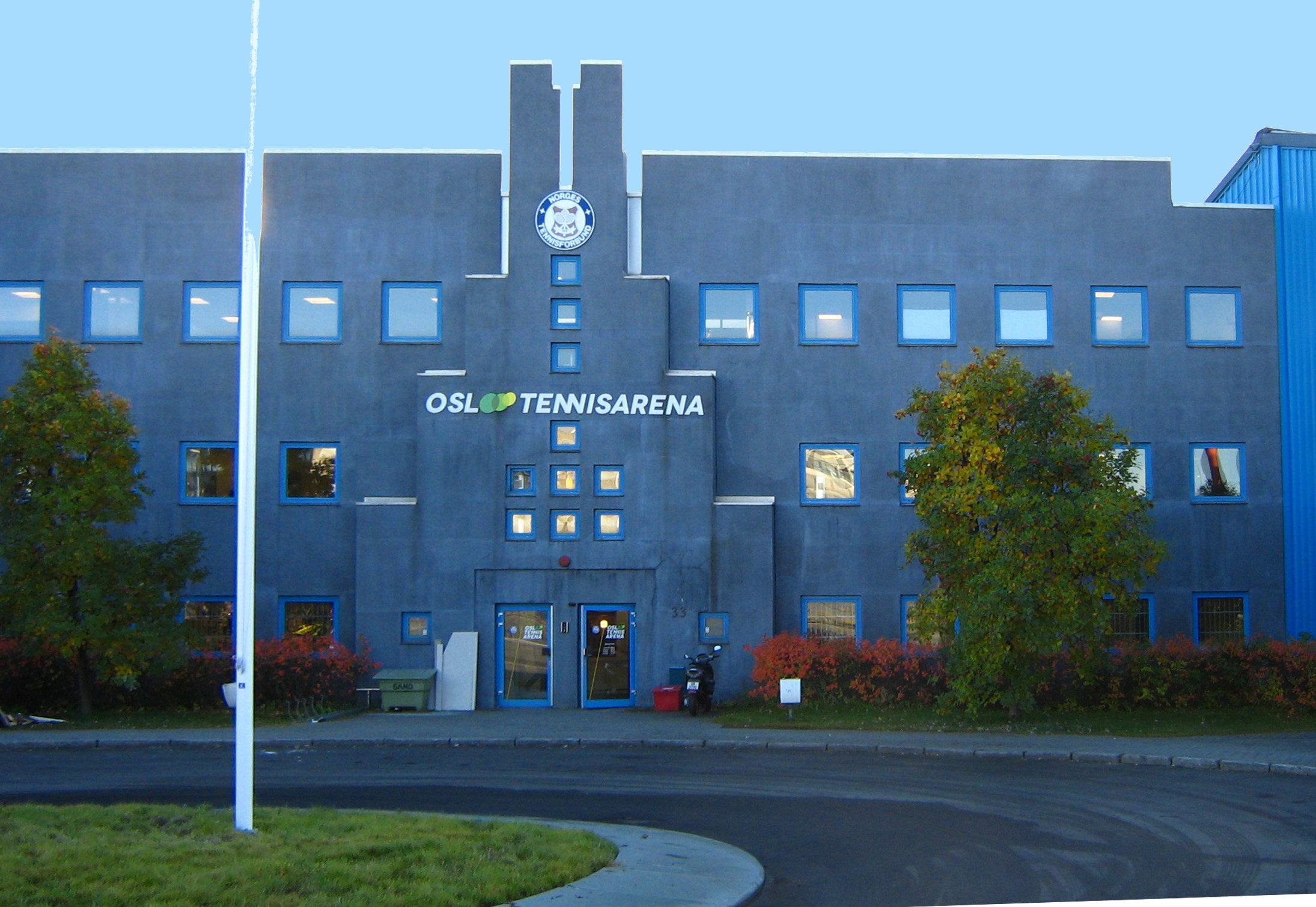 Hala tenisowa w Oslo. Ul. Eikenga 4